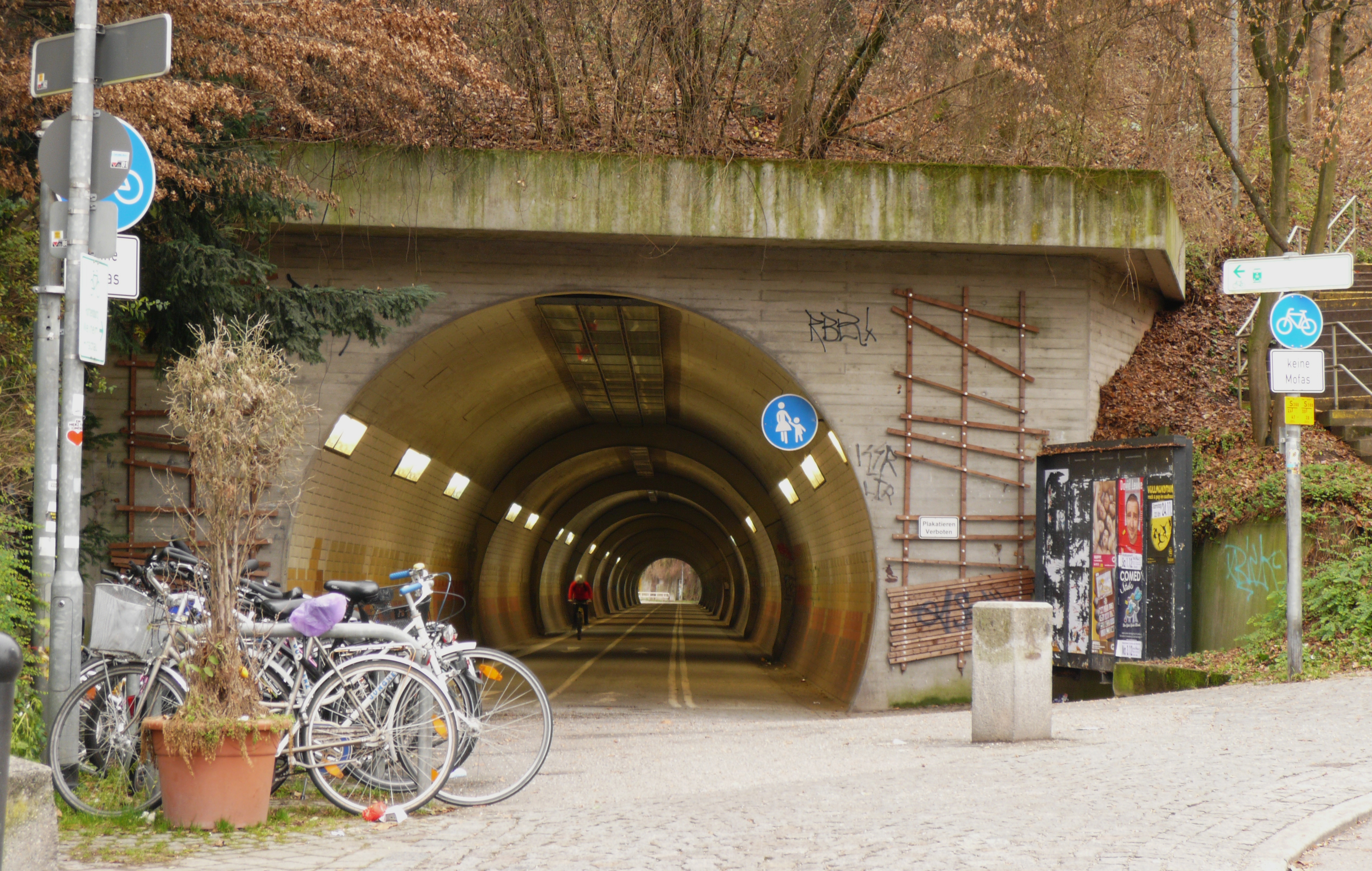 Fußgängertunnel unter dem Schlossberg in Tübingen, Nordportal